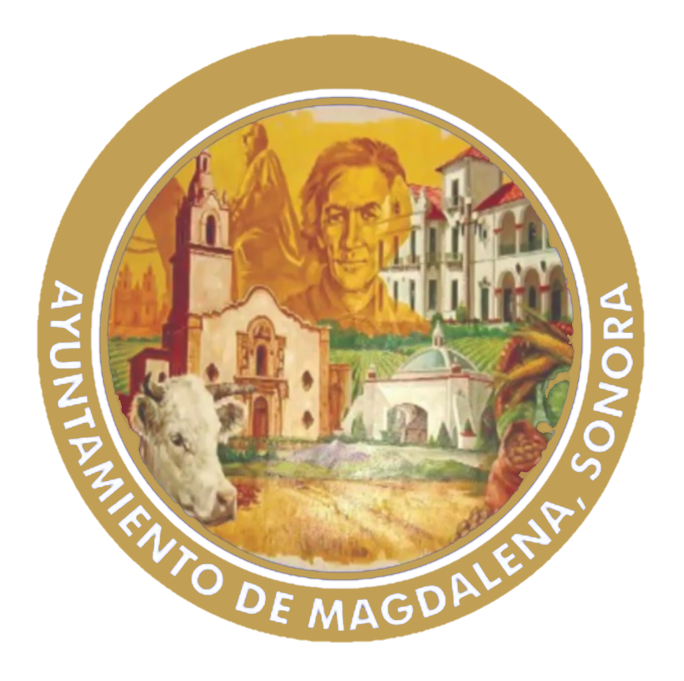 Escudo del municipio sonorense.